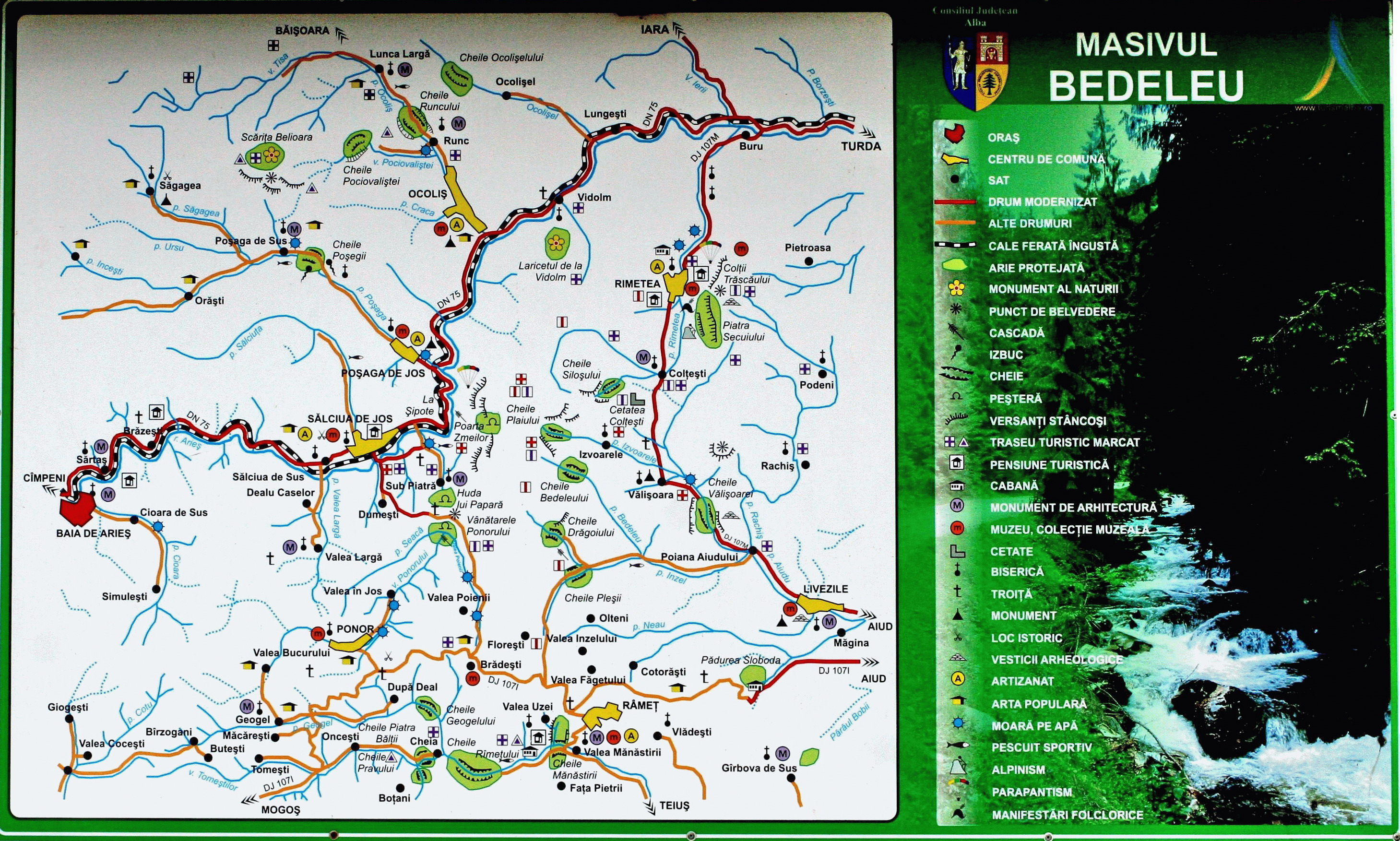 Masivul Bedeleu (panou informativ)